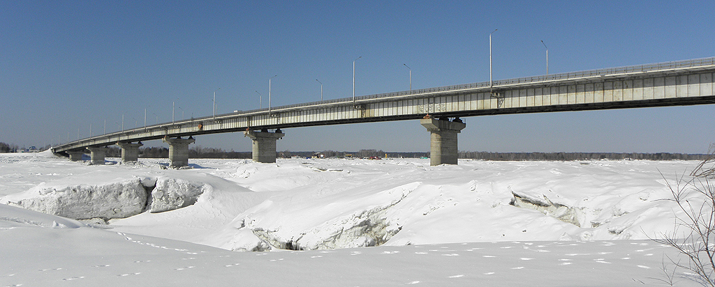 Томский коммунальный мост через р. Томь